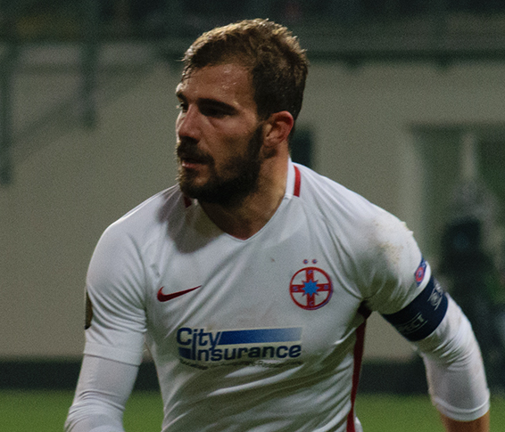 Mihai Bălașa